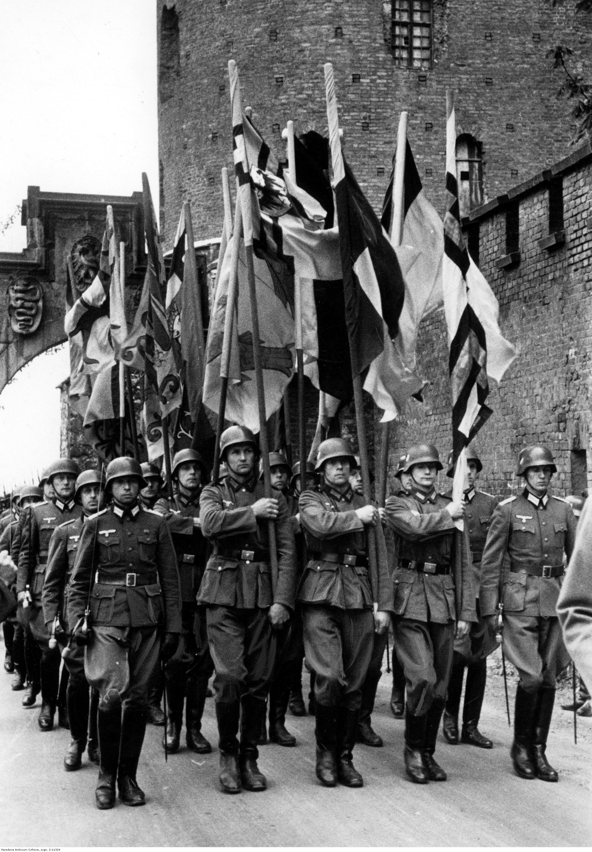 Wyprowadzenie chorągwi krzyżackich z Zamku Królewskiego na Wawelu przez żołnierzy Wehrmachtu – widoczna Brama Bernardyńska i Baszta Sandomierska.